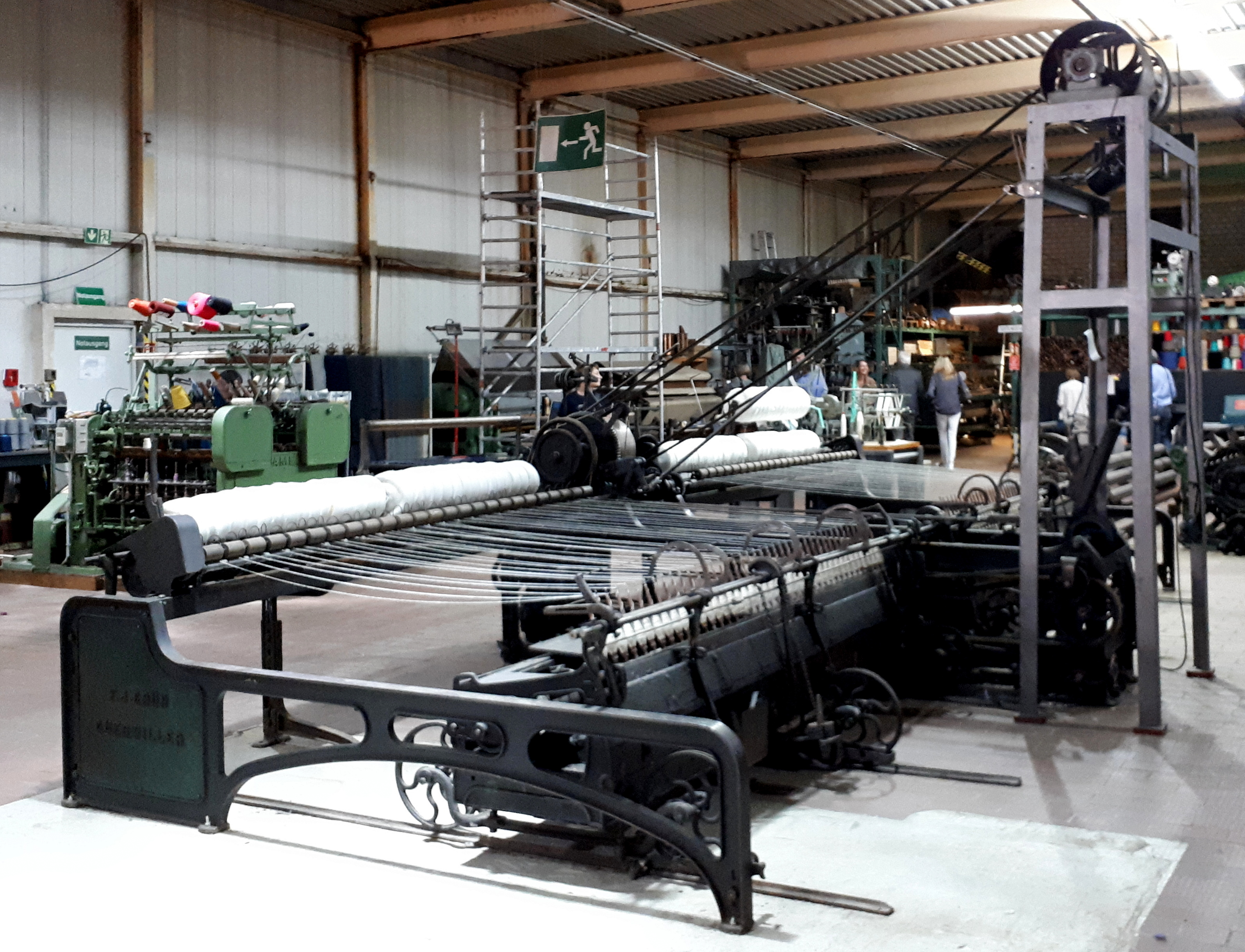 Selfaktor aus dem Jahr 1913 der Firma F. J. Grün in Guebwiller im Elsass; Exponat der Streichgarnspinnerei Guillaume in St. Cecile/Belgien für das Tuchwerk Aachen